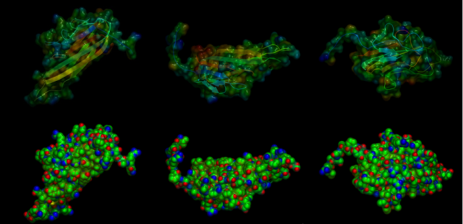 Estructura 3D del TNF-a